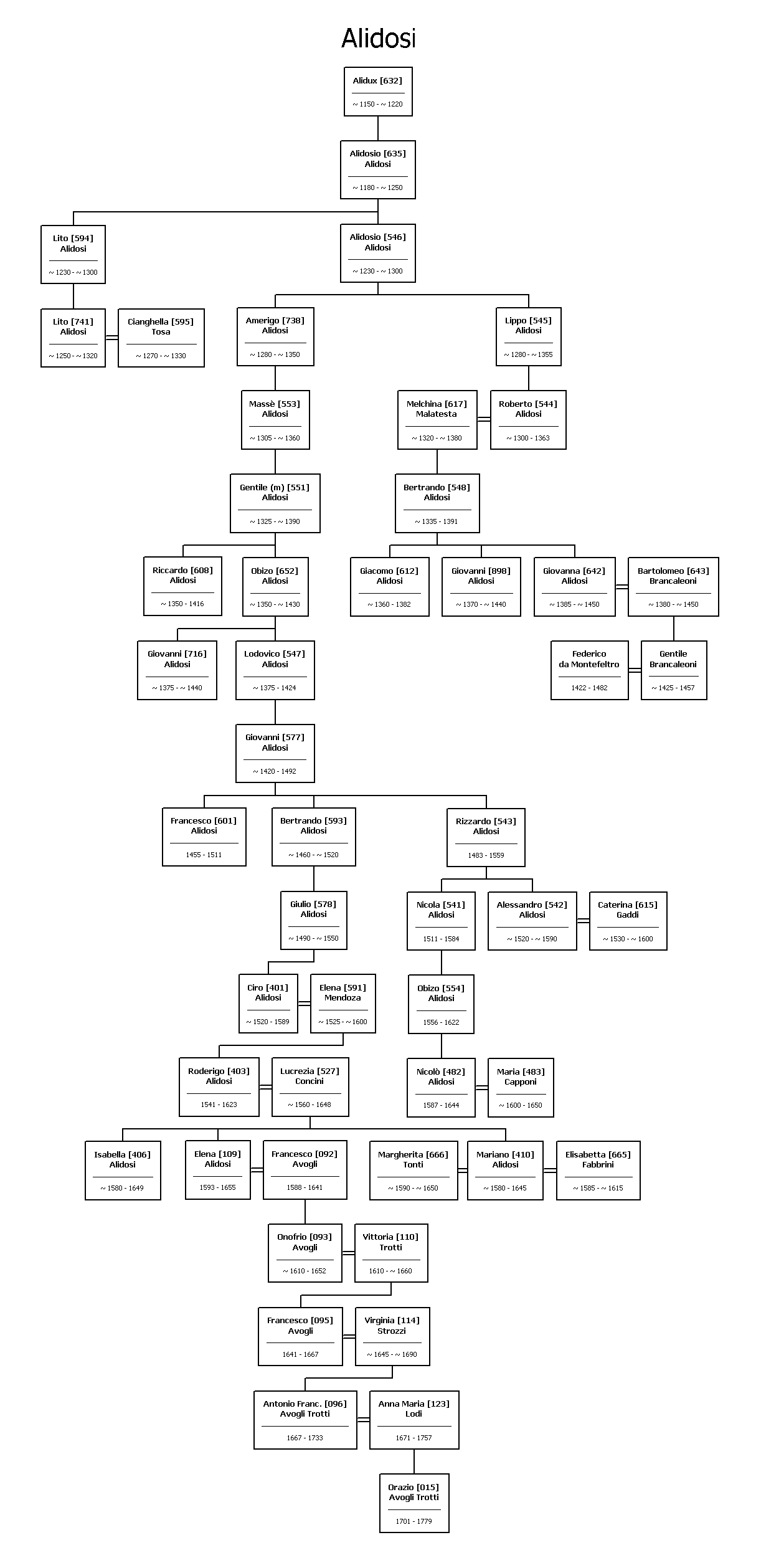 Albero genealogico Alidosi Dettagli Autore: Pietro Noli